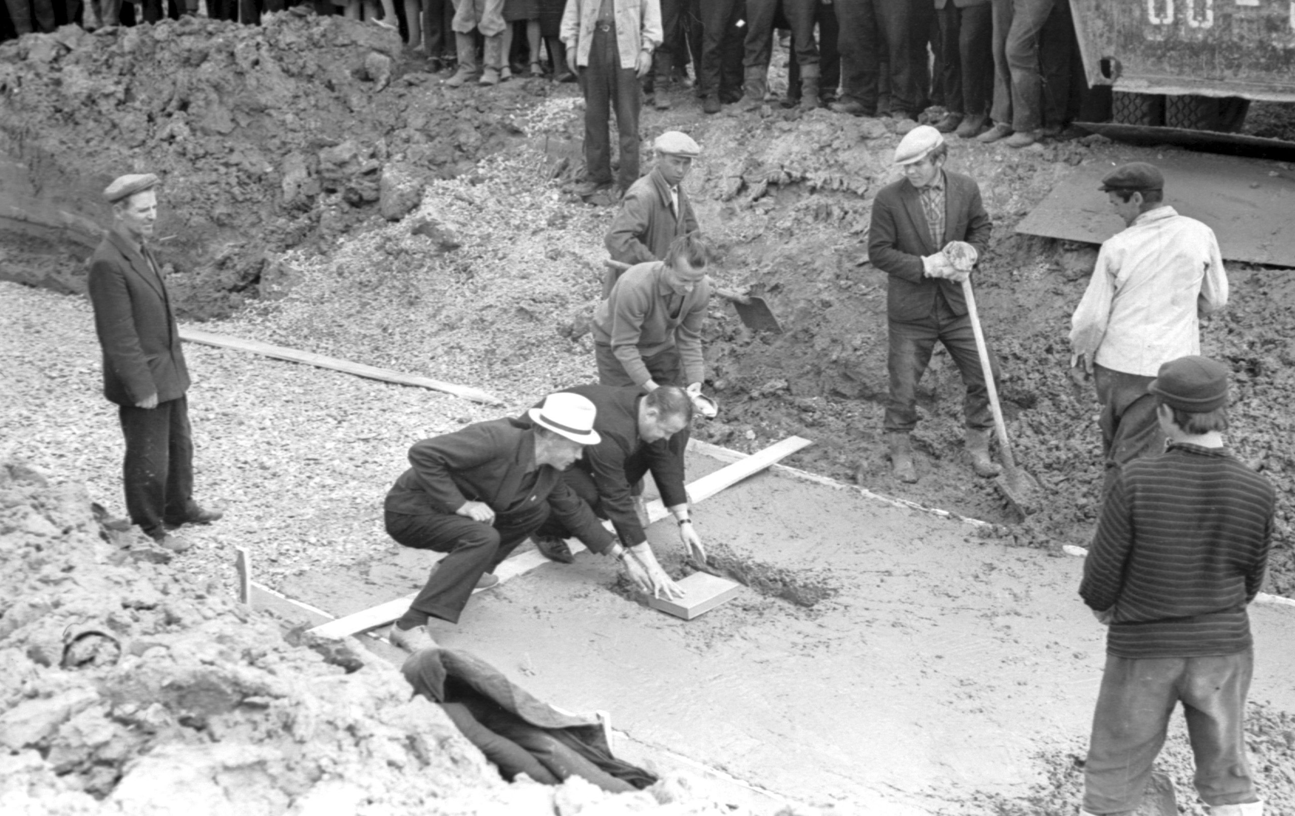 Из истории Скопинского автоагрегатного завода